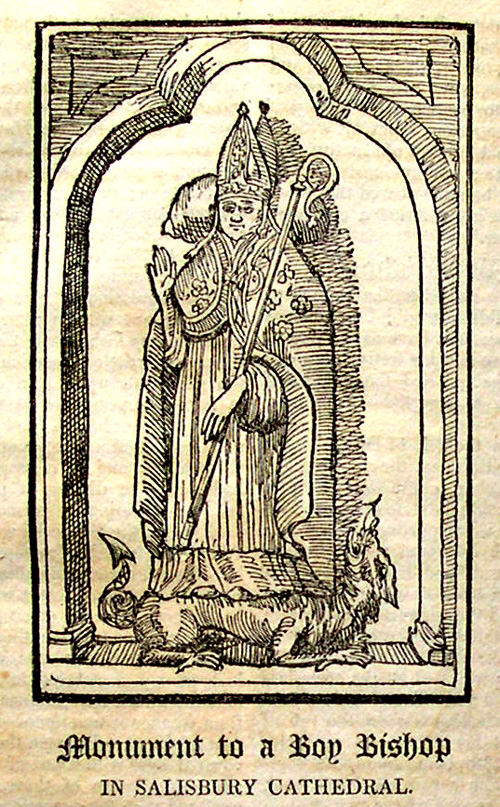 Памятник Мальчику-епископу в Солсберийском Кафедральном соборе